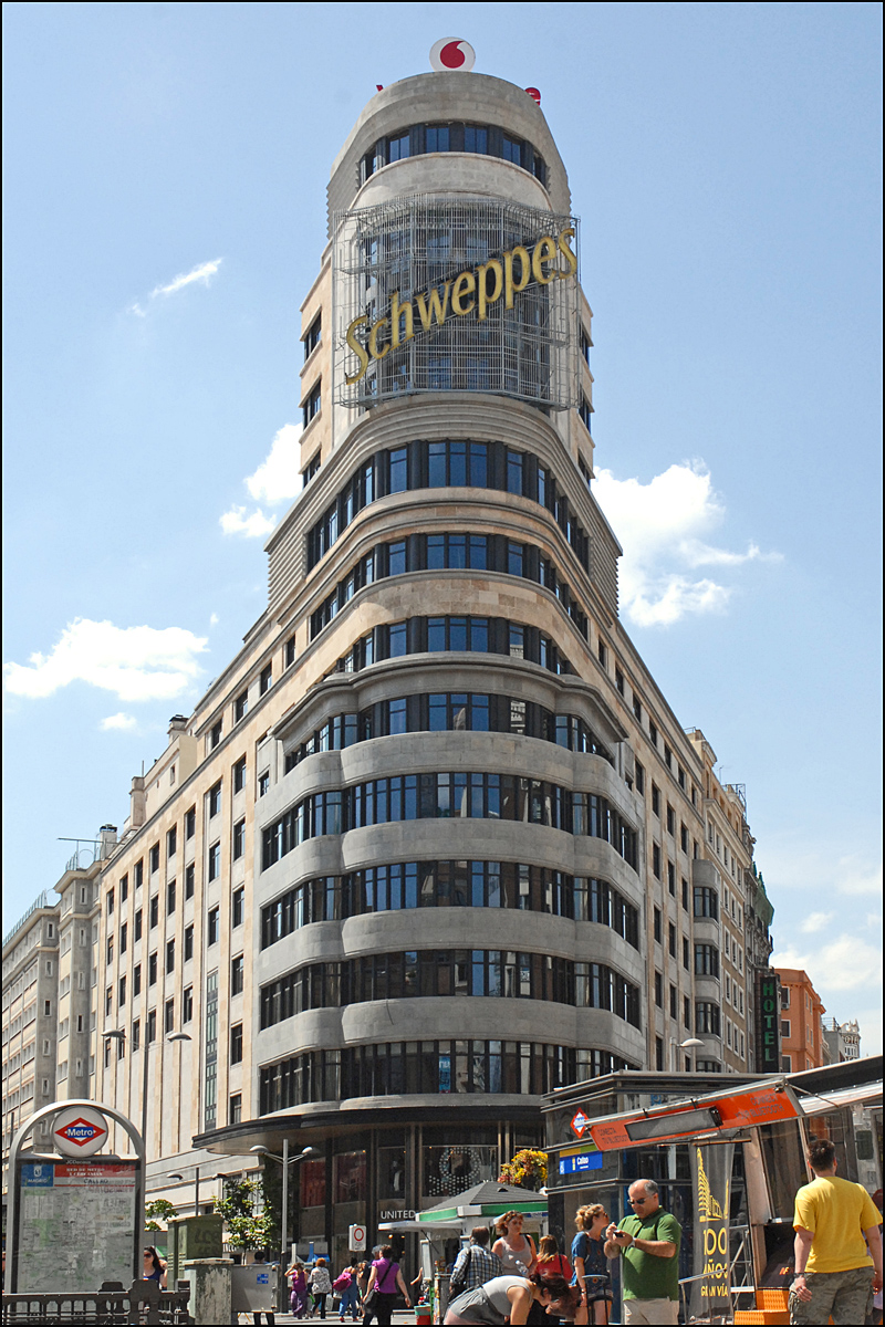 Cet immeuble d'angle appelé Capitol, comprend un cinéma, il a été construit en 1931-1933 dans le style art déco par les architectes Luis Martinez-Feduchi Ruiz et Vicente Eced.